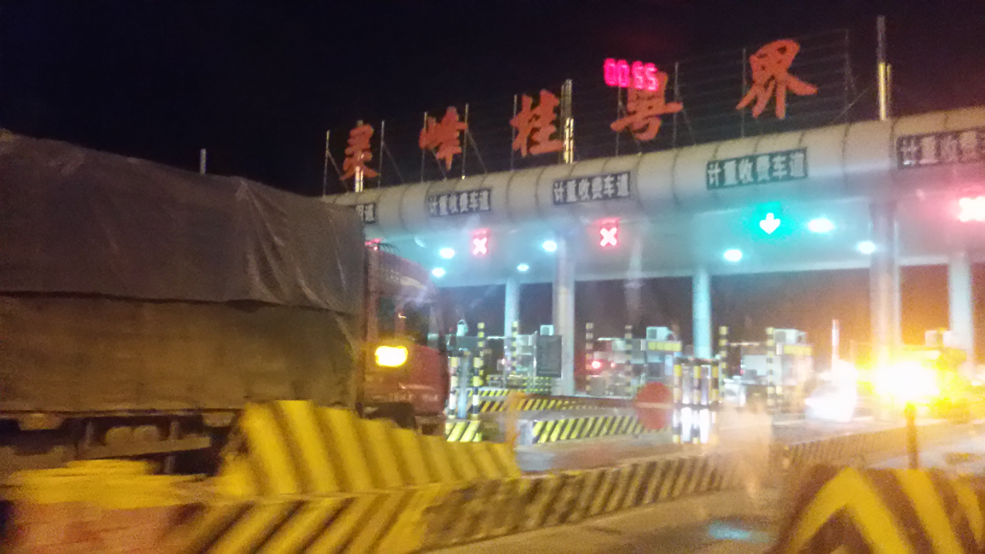 粵語: 靈峯桂粵界（廣賀高速公路嘅兩廣交界）